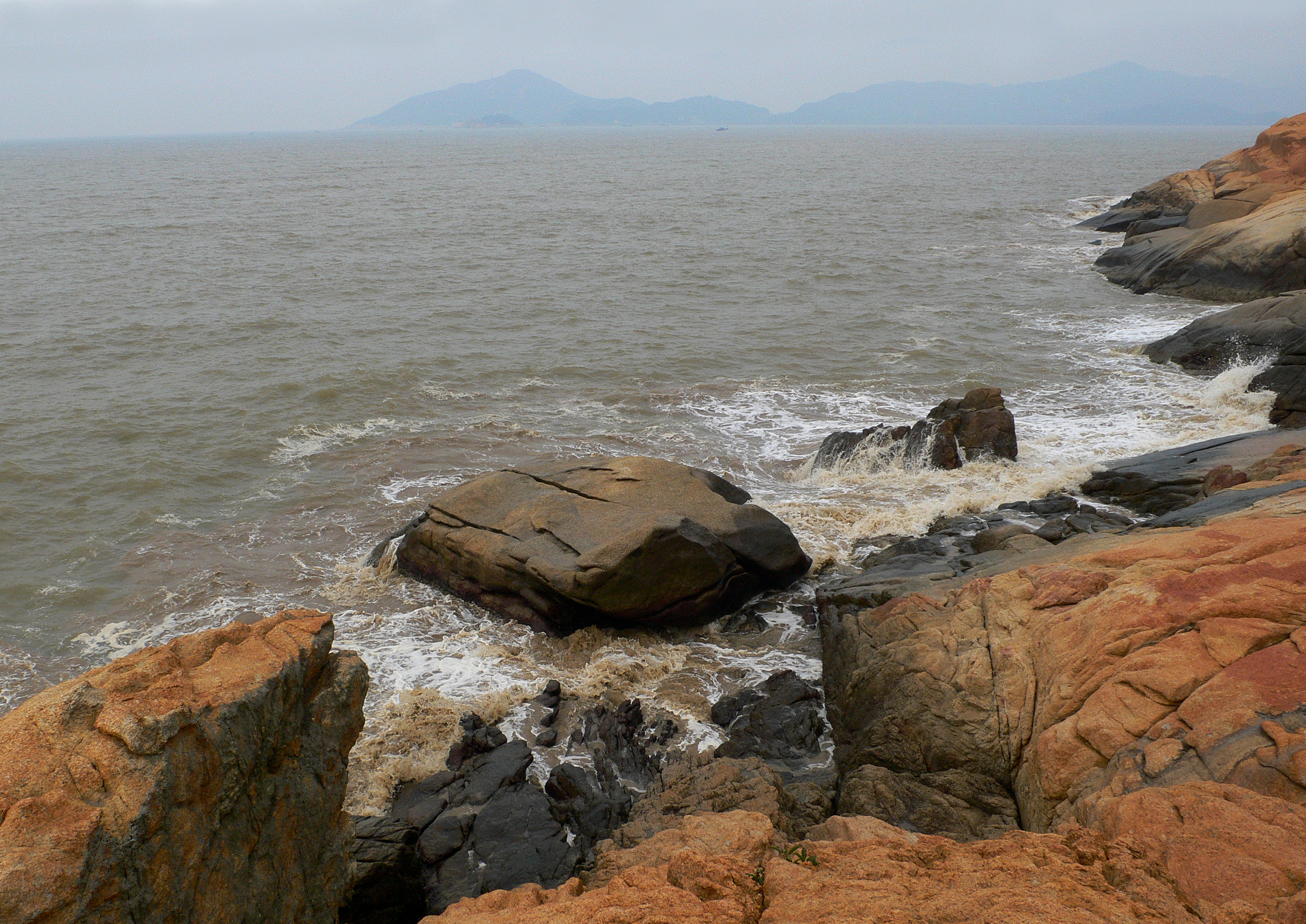 Les rochers de l'île de Coloane. Mer de chine méridionale. Intéressante promenade magnifiquement aménagée entre la plage de Hac Sa et celle de Cheoc Van.